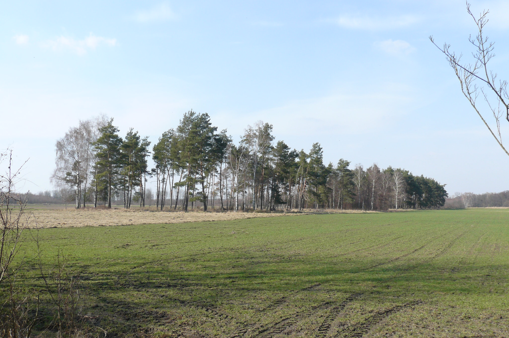 Dolina Obry w rejonie Kościana. Kanały Obrzańskie.